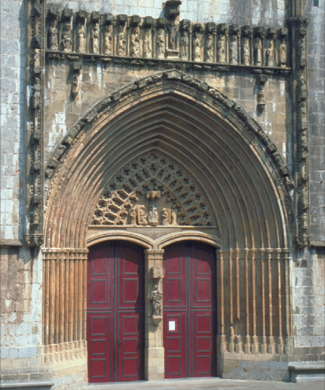 Jasokundeko Andre Mariaren ataria, Lekeitio